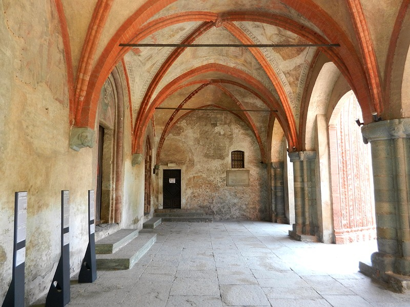 Buttigliera Alta - Portico antistante l'ingresso dell'Abbazia di S. Antonio di Ranverso